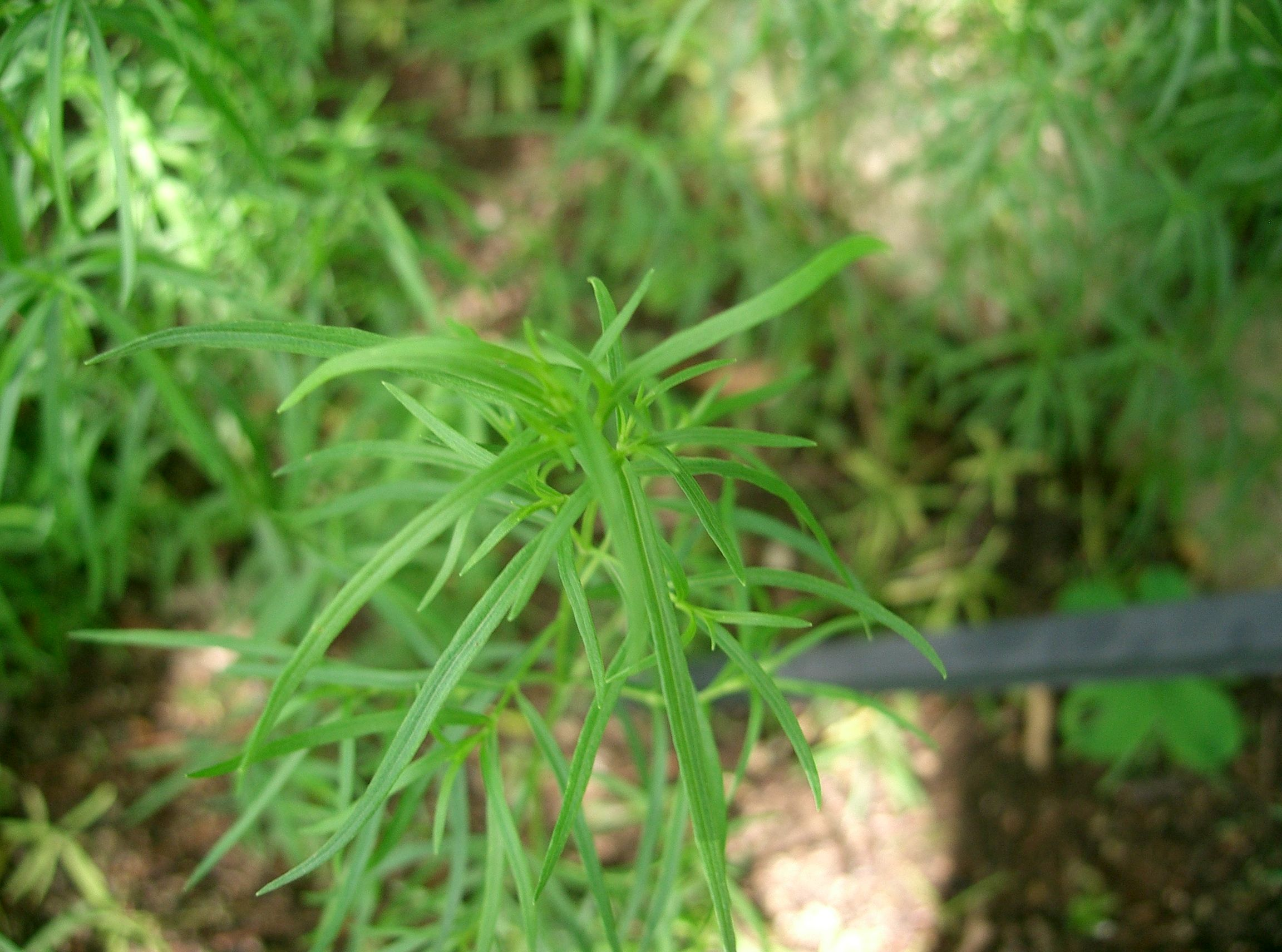 Artemisia dracunculus